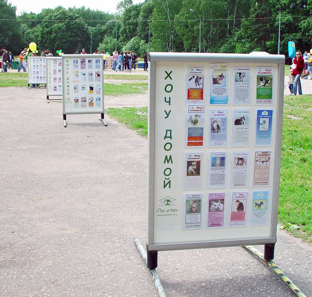 фотография праздника, организованного форумом "Пес и кот" в парке «Кузьминки». Pазрешение автора